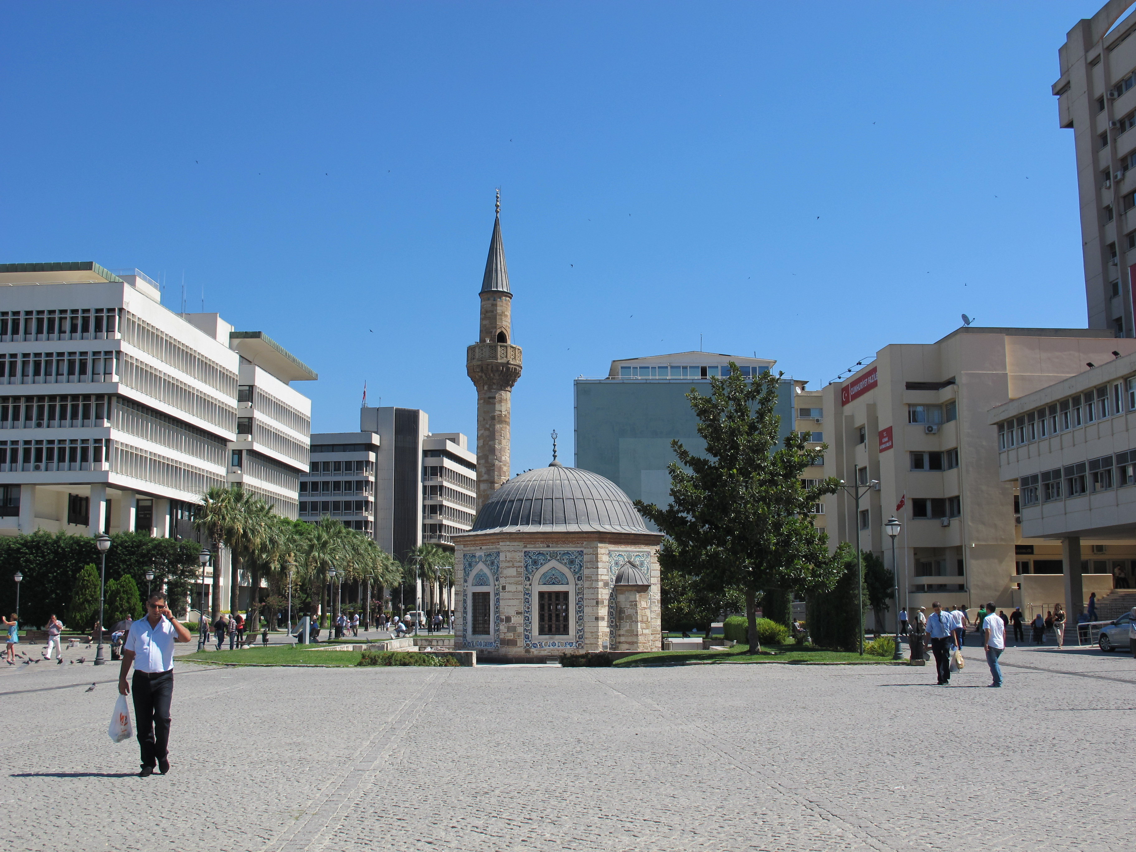 Izmir, moschea di konak